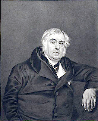 Der russische Fabeldichter Iwan Andrejewitsch Krylow (1769-1844)